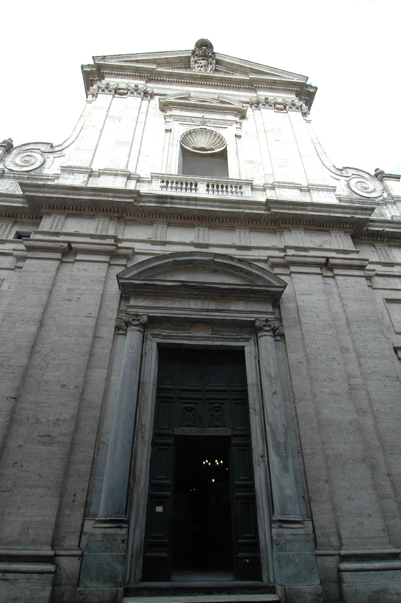 Chiesa di san Giacomo in Augusta, a Roma, nel rione Campo Marzio.